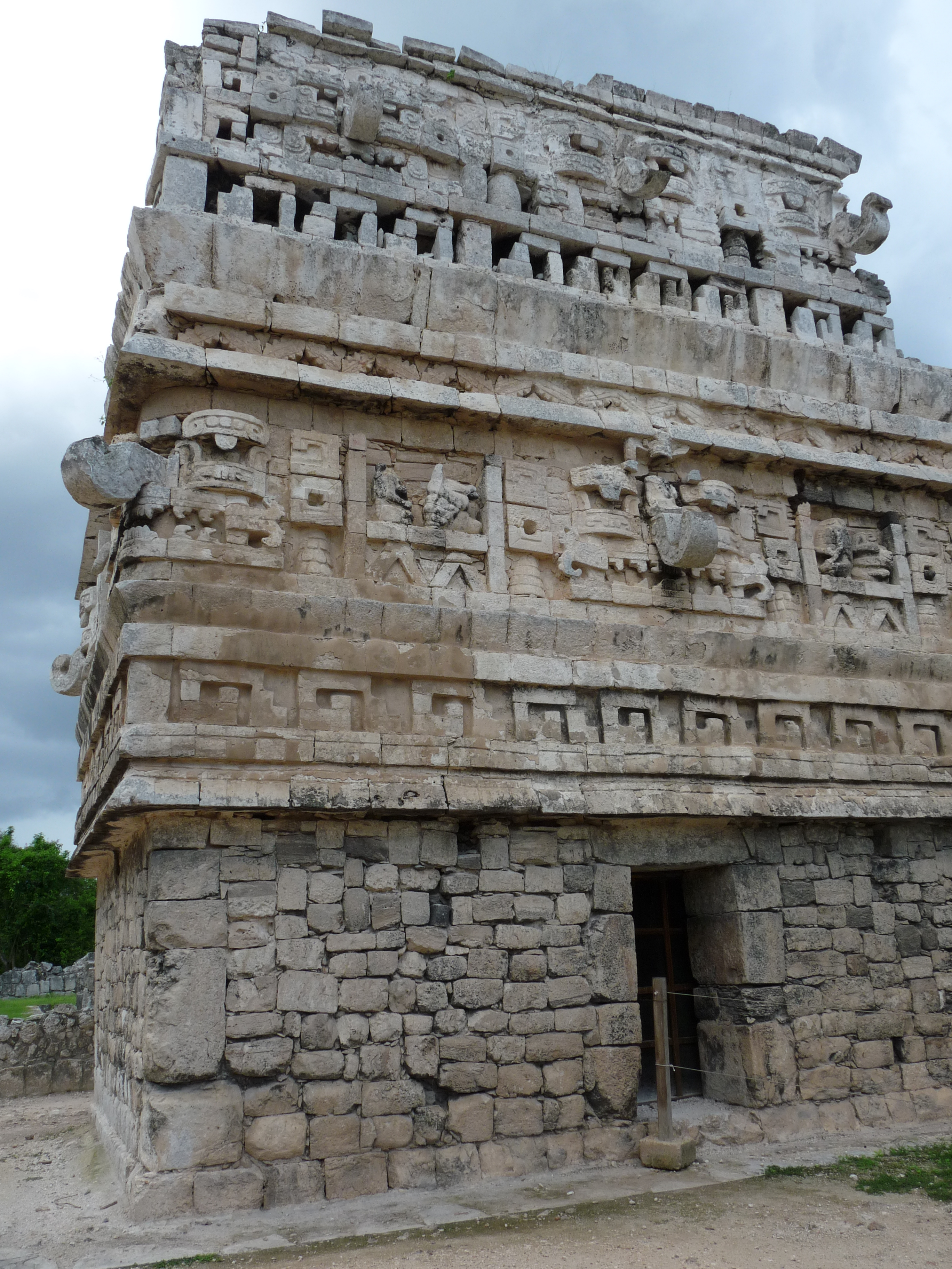 La Iglesia Monument (Chichén Itzá, Mexico).